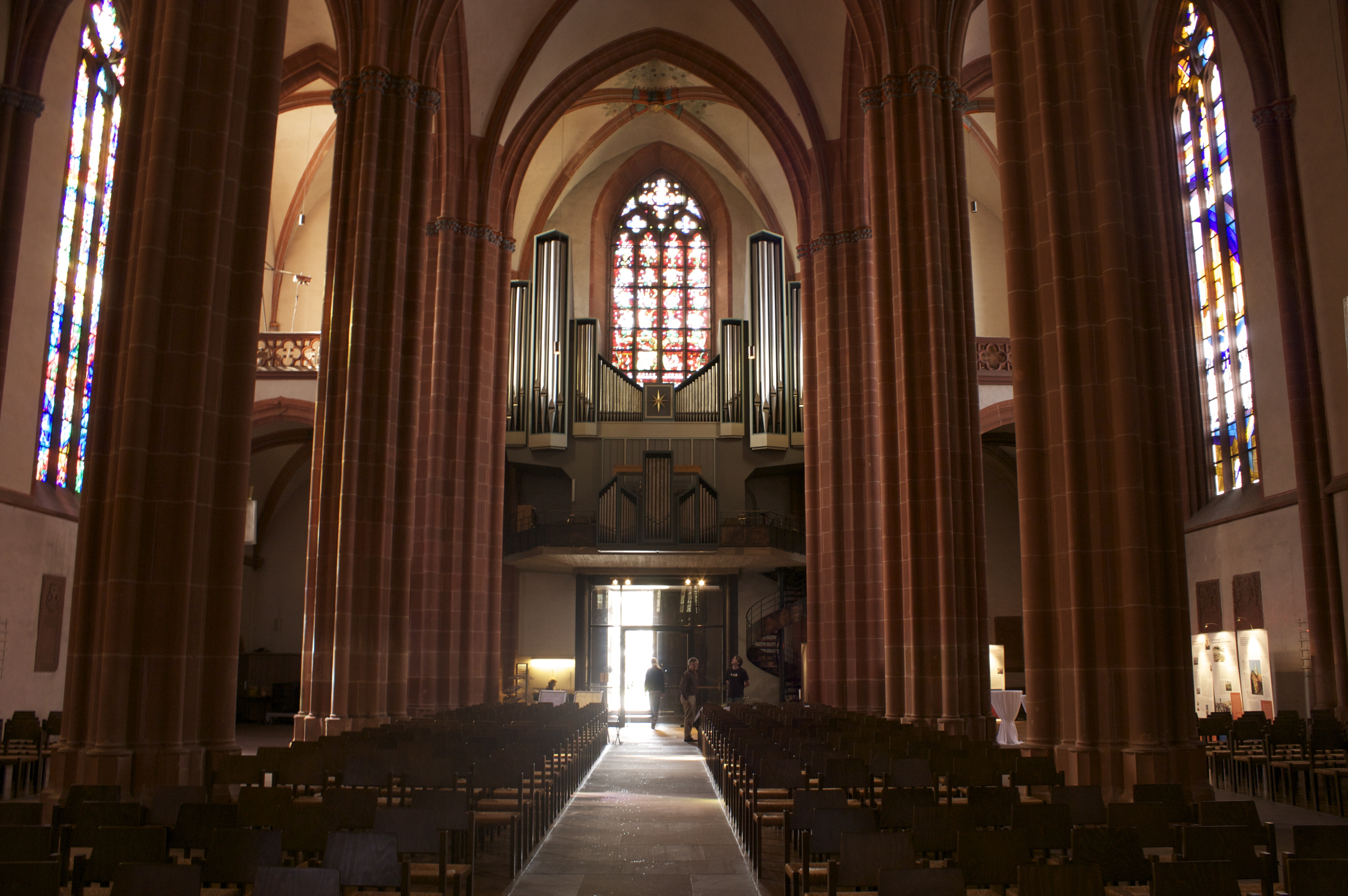 Interior of Stadtkirche Friedberg